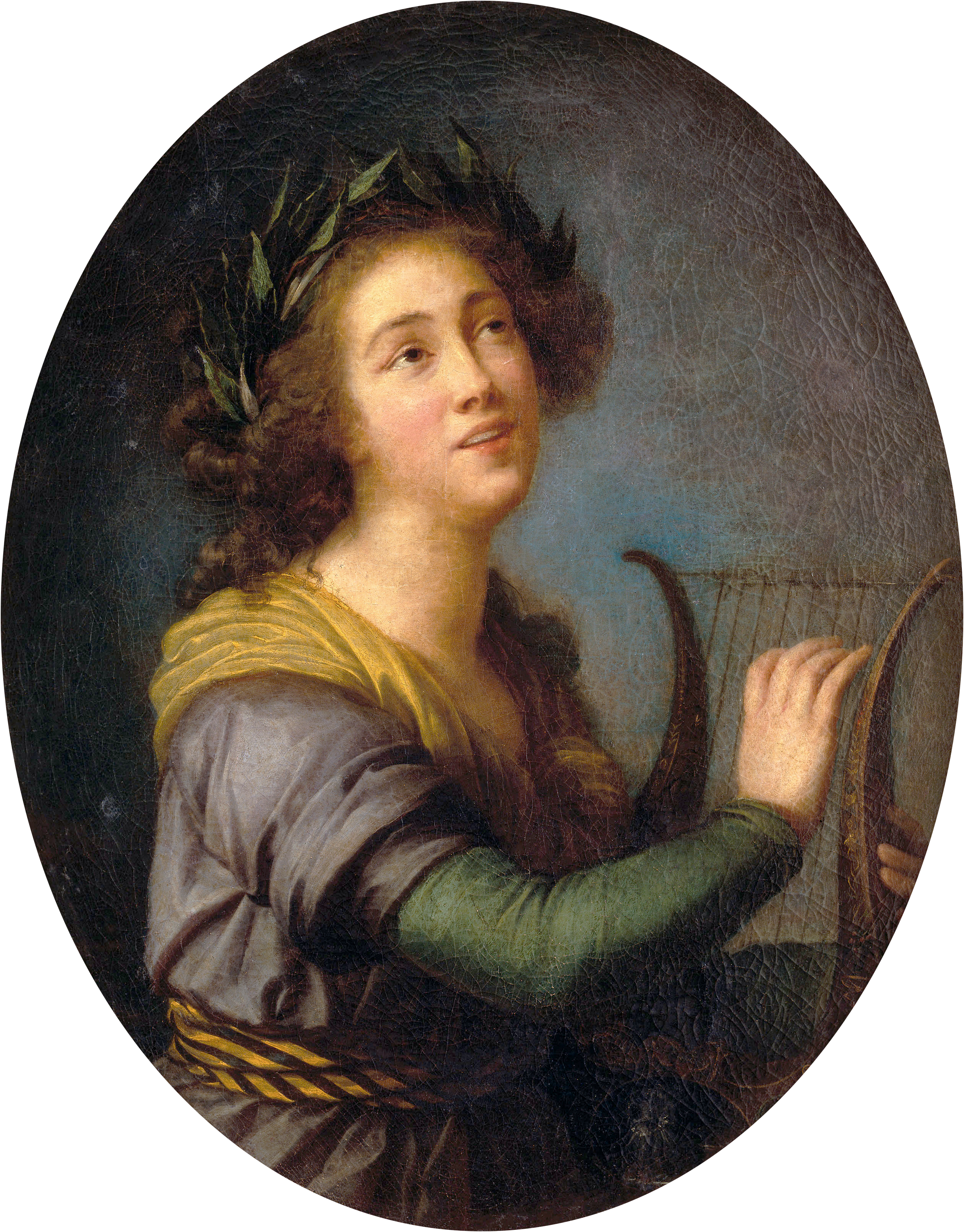 Retrato de Luísa Todi (1789) por Élisabeth Louise Vigée Le Brun, atualmente no Museu da Música, Portugal.